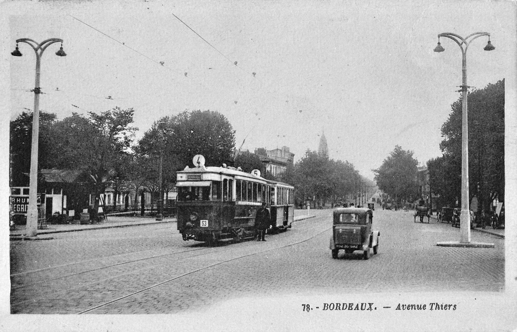 Carte postale ancienne éditée par Artaud à Nantes, n°78 :VBORDEAUX - Avenue Thiers